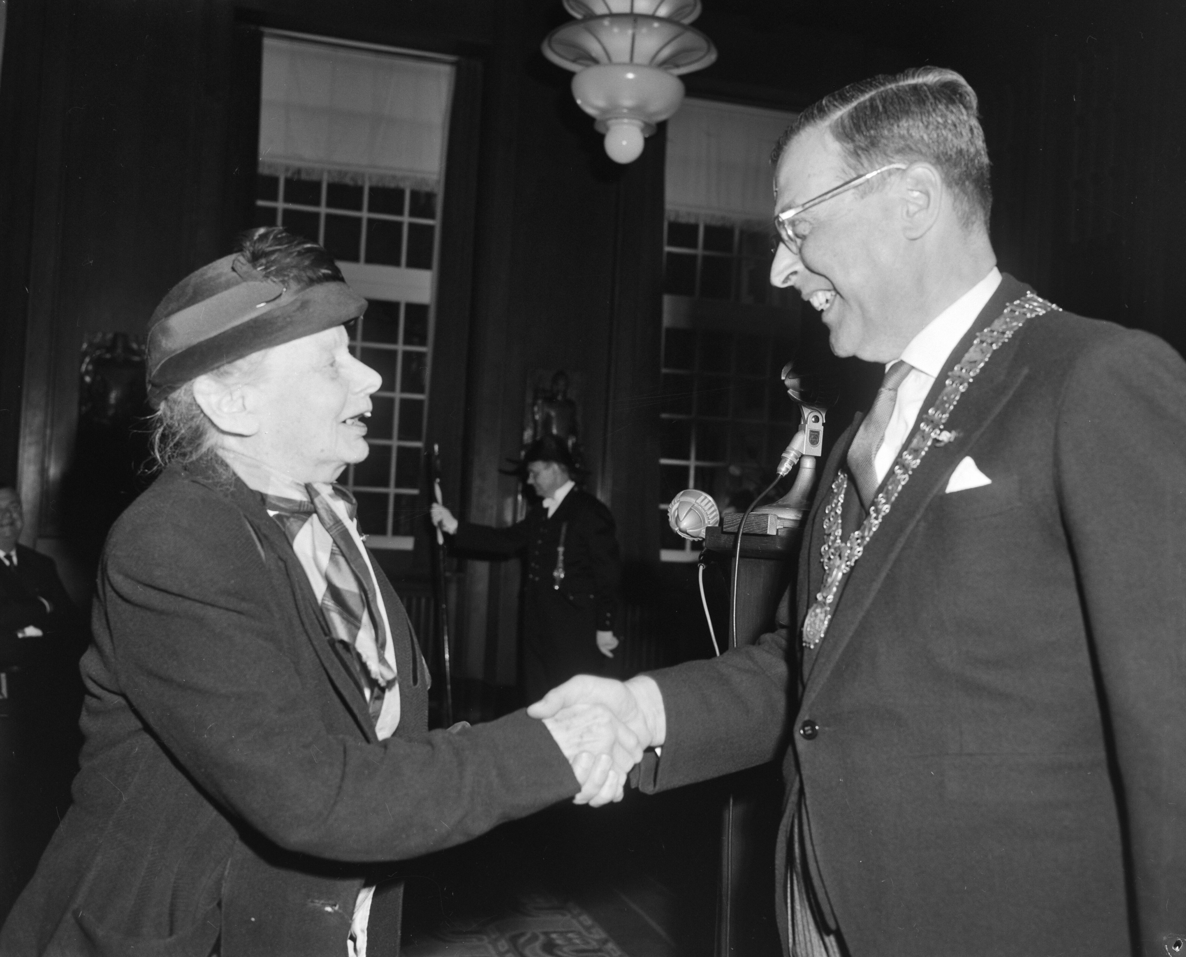 Collectie / Archief : Fotocollectie Anefo Reportage / Serie : [ onbekend ] Beschrijving : Lintjesregen in Amsterdam. Cobo Surie ontvangt van burgemeester Van Hall de onderscheiding. Coba Surie en burgemeester Van Hall Datum : 29 april 1963 Locatie : Amsterdam, Noord-Holland Trefwoorden : onderscheidingen, ontvangsten Persoonsnaam : Hall, Gijs van Fotograaf : Bilsen, Joop van / Anefo Auteursrechthebbende : Nationaal Archief Materiaalsoort : Negatief (zwart/wit) Nummer archiefinventaris : bekijk toegang 2.24.01.04 Bestanddeelnummer : 915-0994